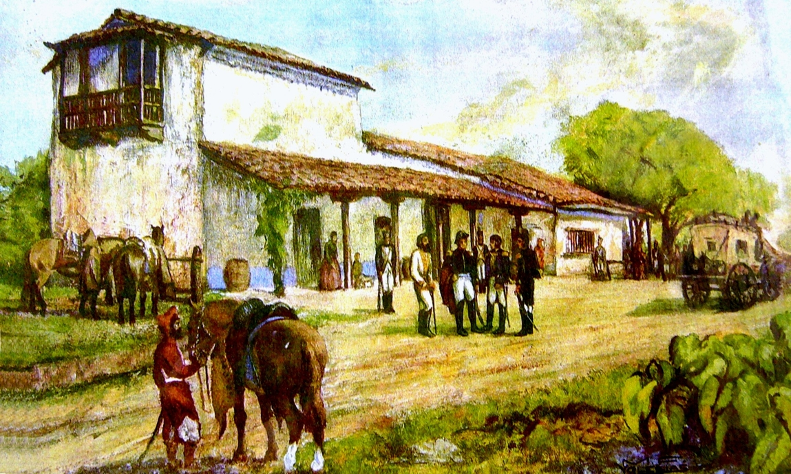 Entrevista en Yatasto entre San Martín - Manuel Belgrano y Güemes. Oleo sobre tela de Manuel Francisco Yglesias.